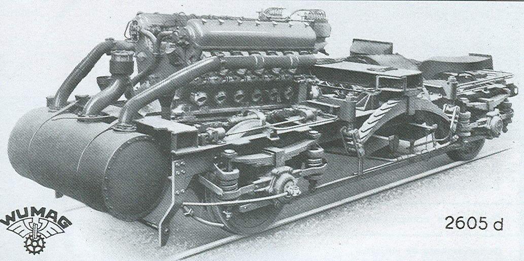 Maschinendrehgestell des VT 877 auf einer Werksaufnahme von WUMAG